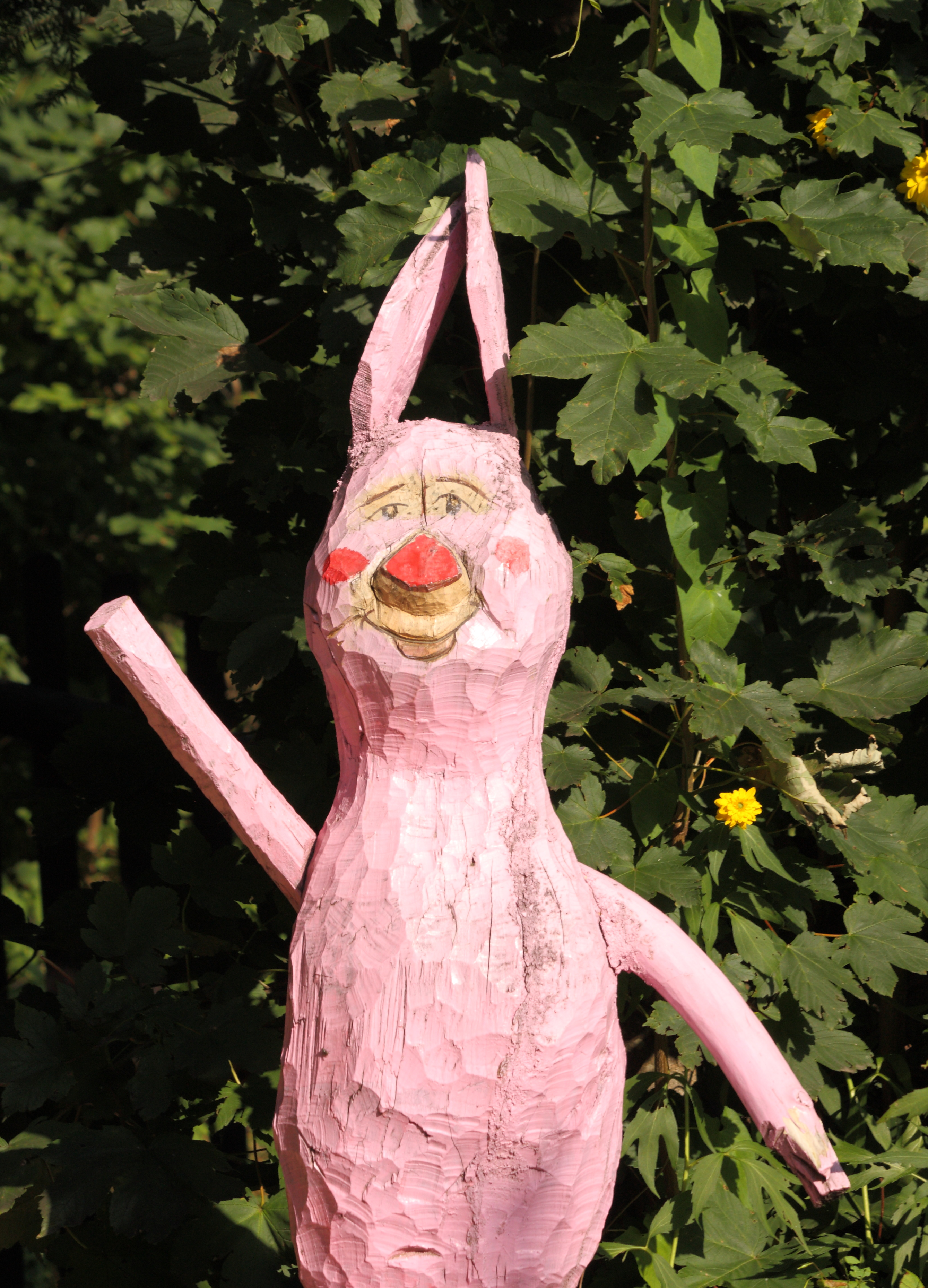 Prosiaczek w Ogrodzie Bajek w Międzygórzu